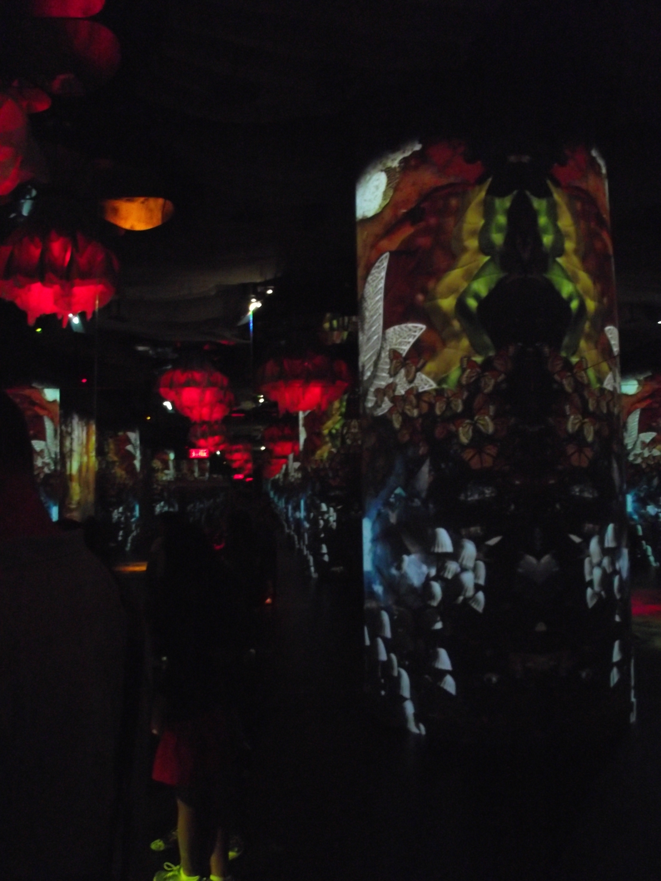 Le palais des saisons, spectacle visuel au Musée Grévin Montréal